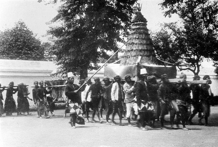 Repronegatief. In een optocht te Yogyakarta wordt een gunungan (ceremoniële rijstberg) gedragen ter gelegenheid van de 'Garebeg', een islamitisch offerfeest op Java ter herdenking van de geboortedag van de profeet Mohammed